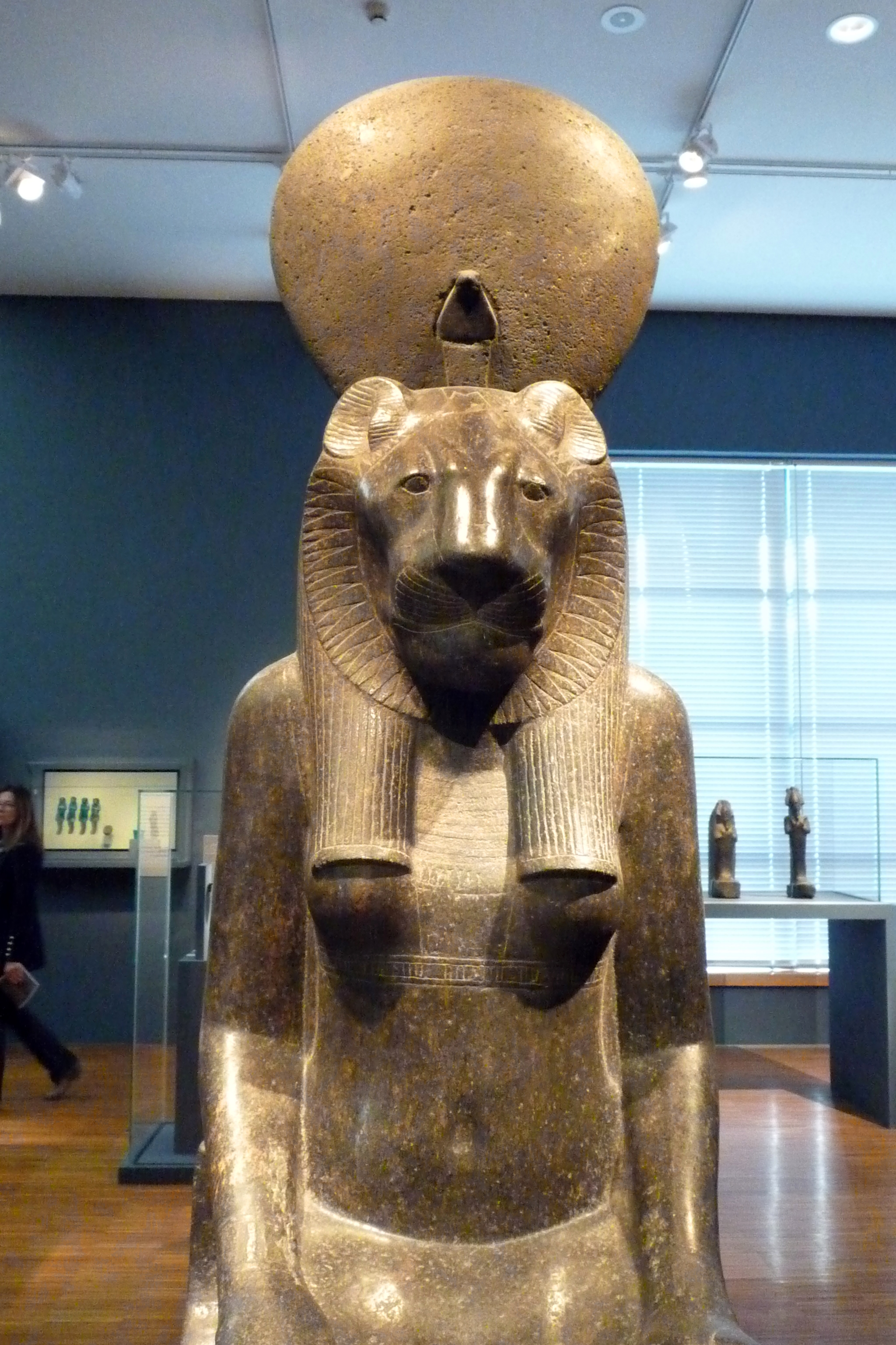 Déesse Sekhmet durant le règne d'Amenhotep III (1391-1353 av. JC). Statue en granite remployée par Chéchong Ier (943-922 av. JC). Site du temple de Mout à Karnak (collection musée du Louvre) - Servir les dieux d'Égypte du 25 octobre 2018 au 27 janvier 2019 - Musée de Grenoble.